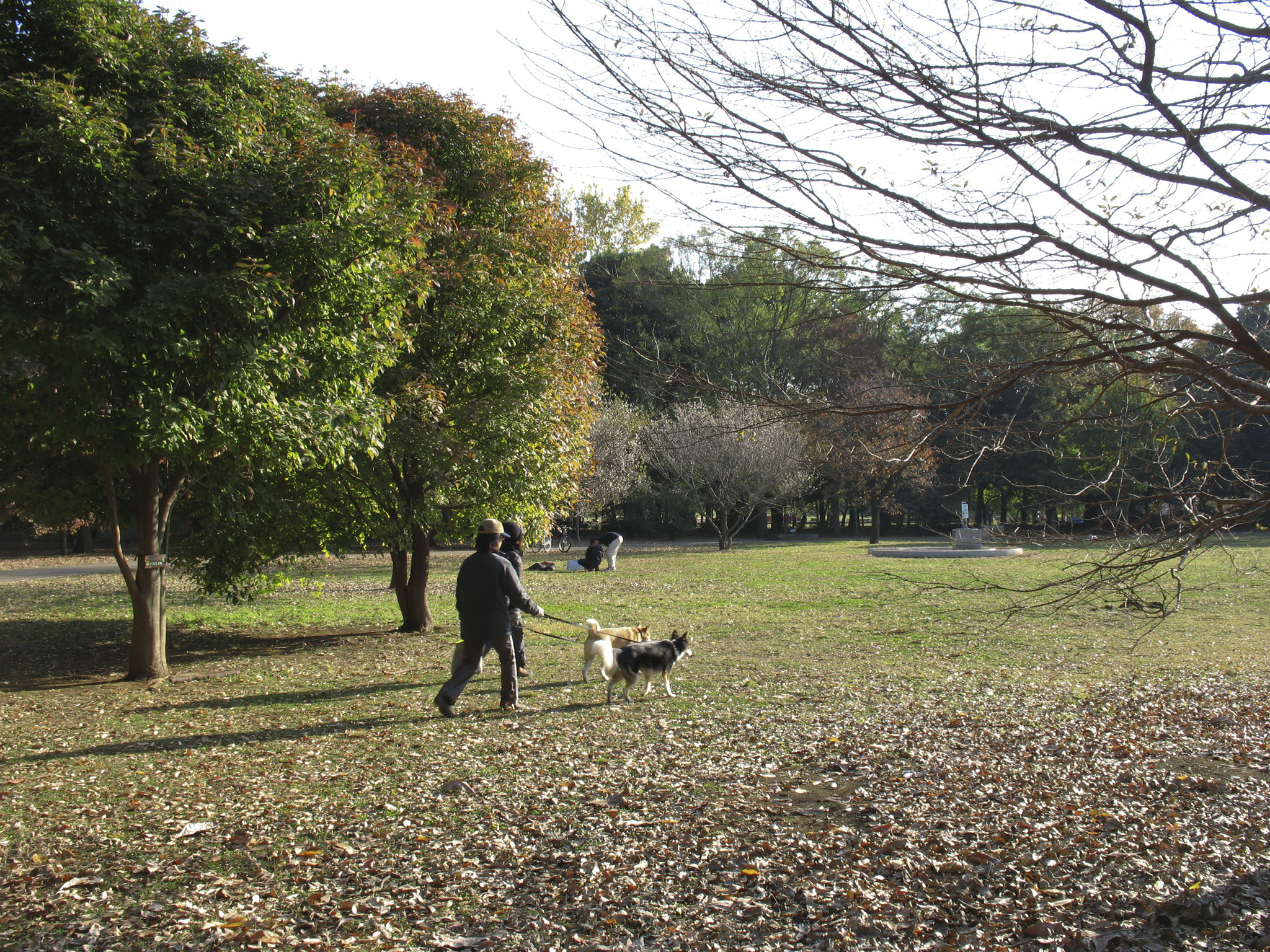 砧公園。